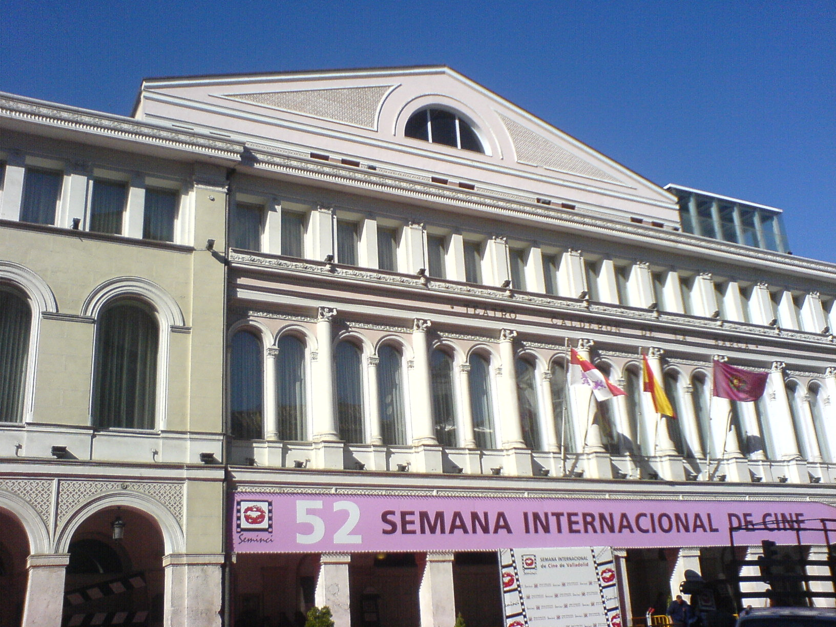 Teatro Calderón de Valladolid engalanado con motivo de la Seminci 2007